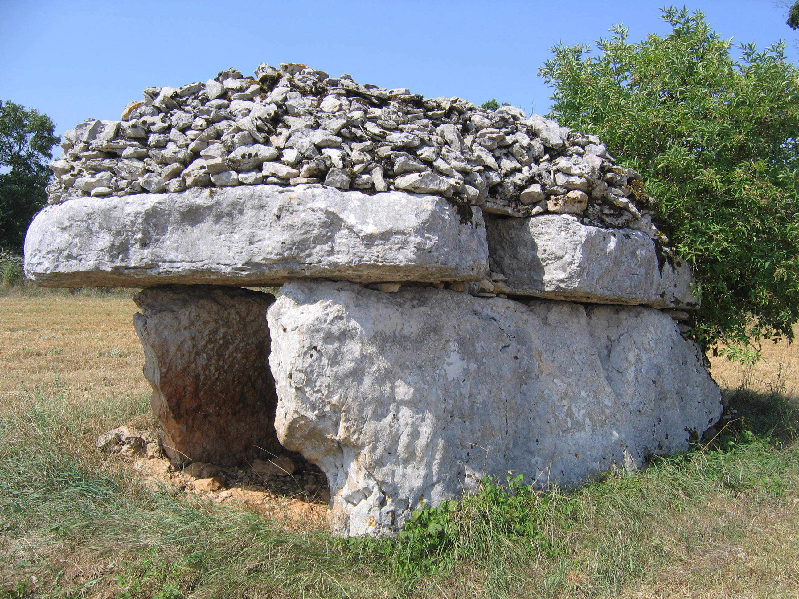 Description: Dolmen du Verdier, Commune de Durbans Lot, France Source: Hugo Soria Licence: GFDL Hugo Soria